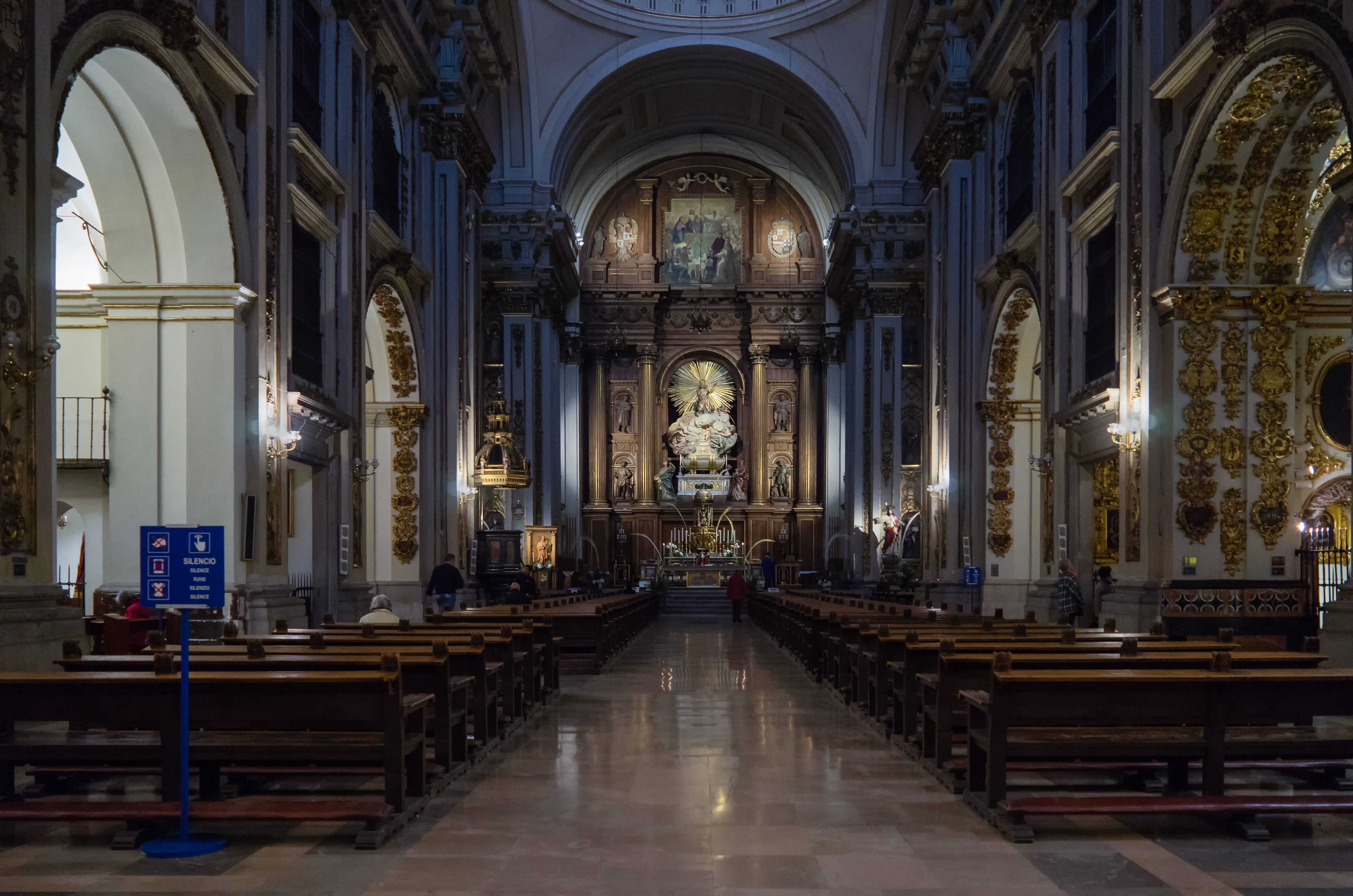 Colegiata de San Isidro (Madrid) rq